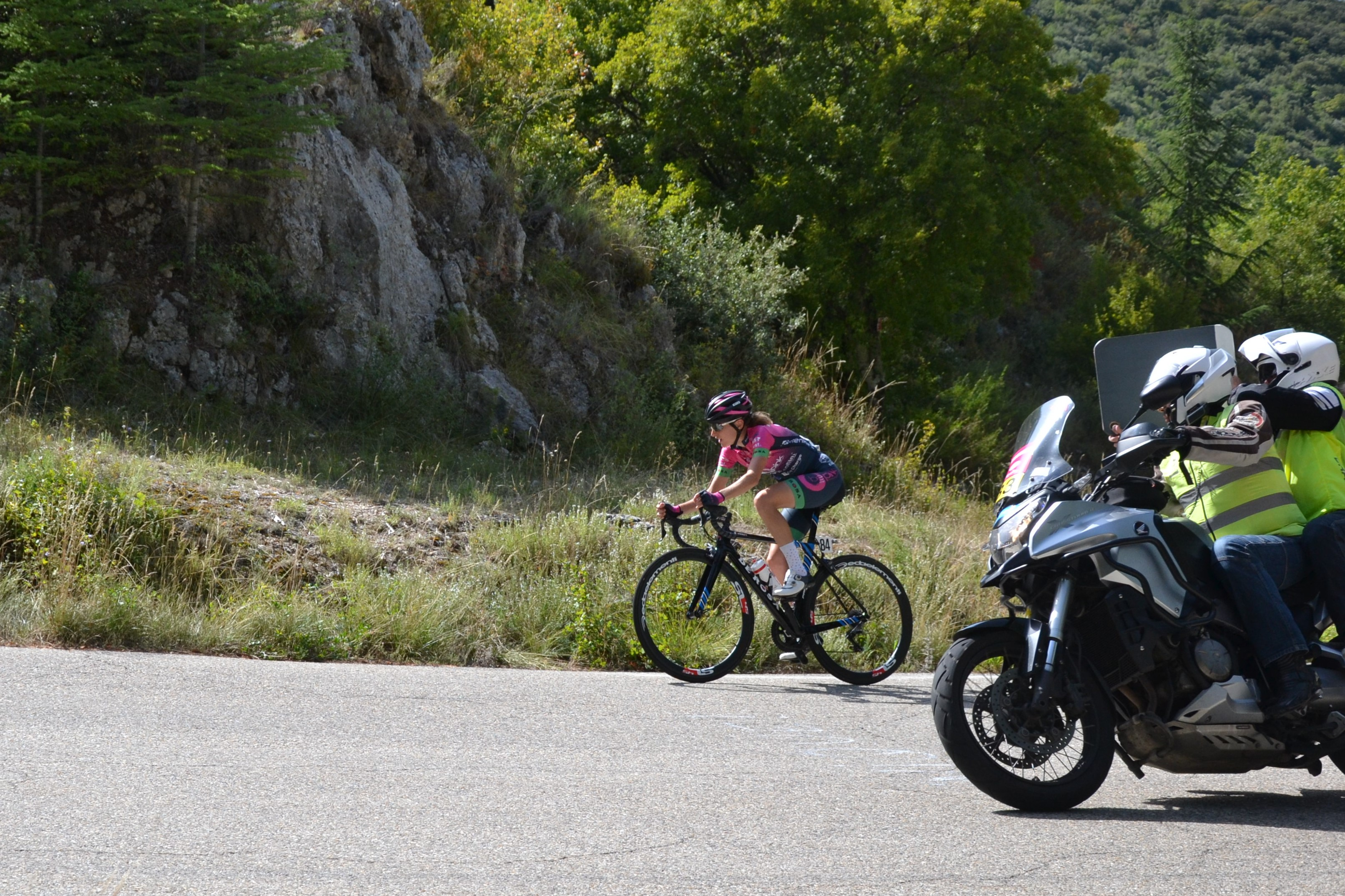 Tour féminin international de l'Ardèche 2019, étape 3, dans les gorges de Murs